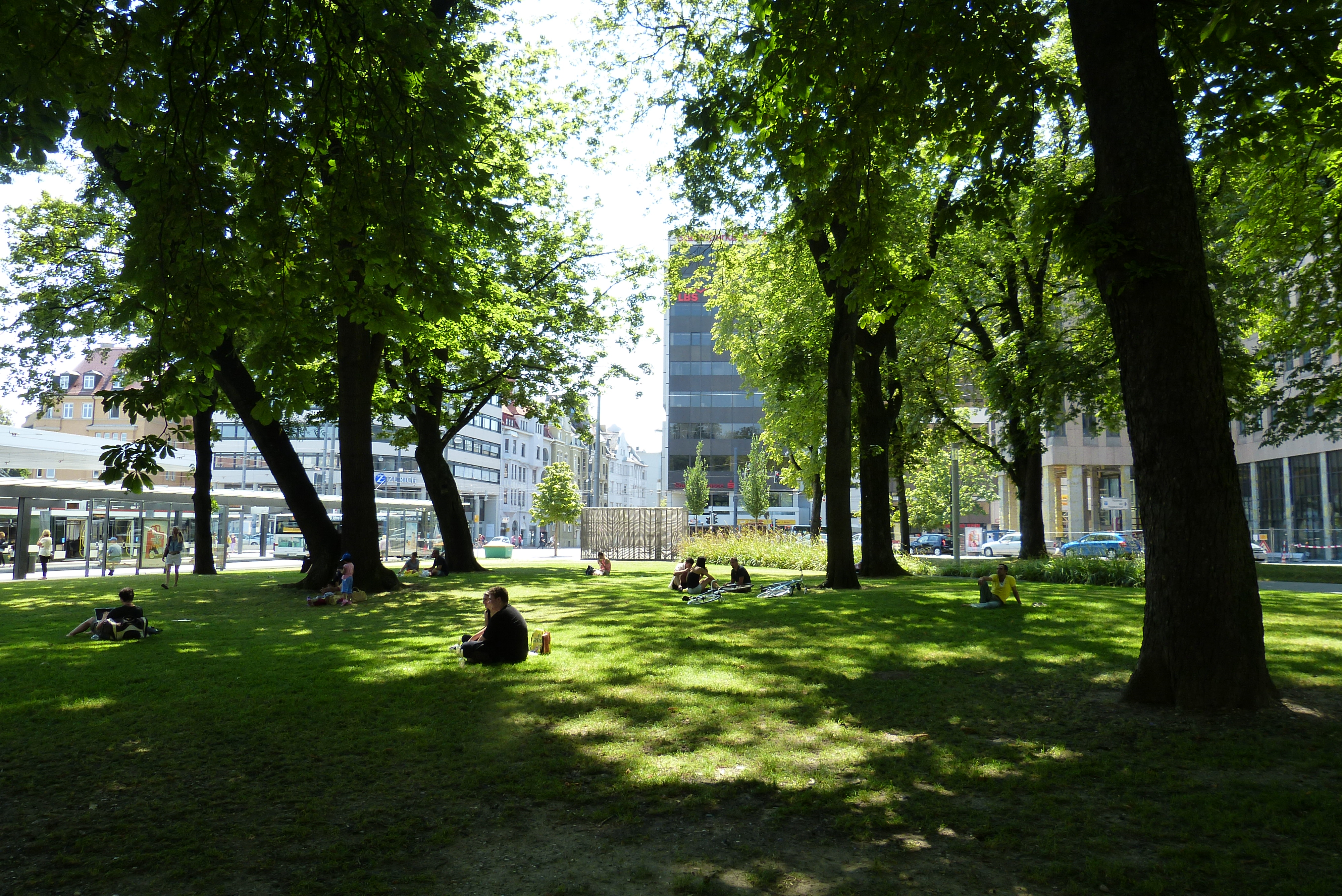 Augsburg Königsplatz, unter den Bäumen im Sommer